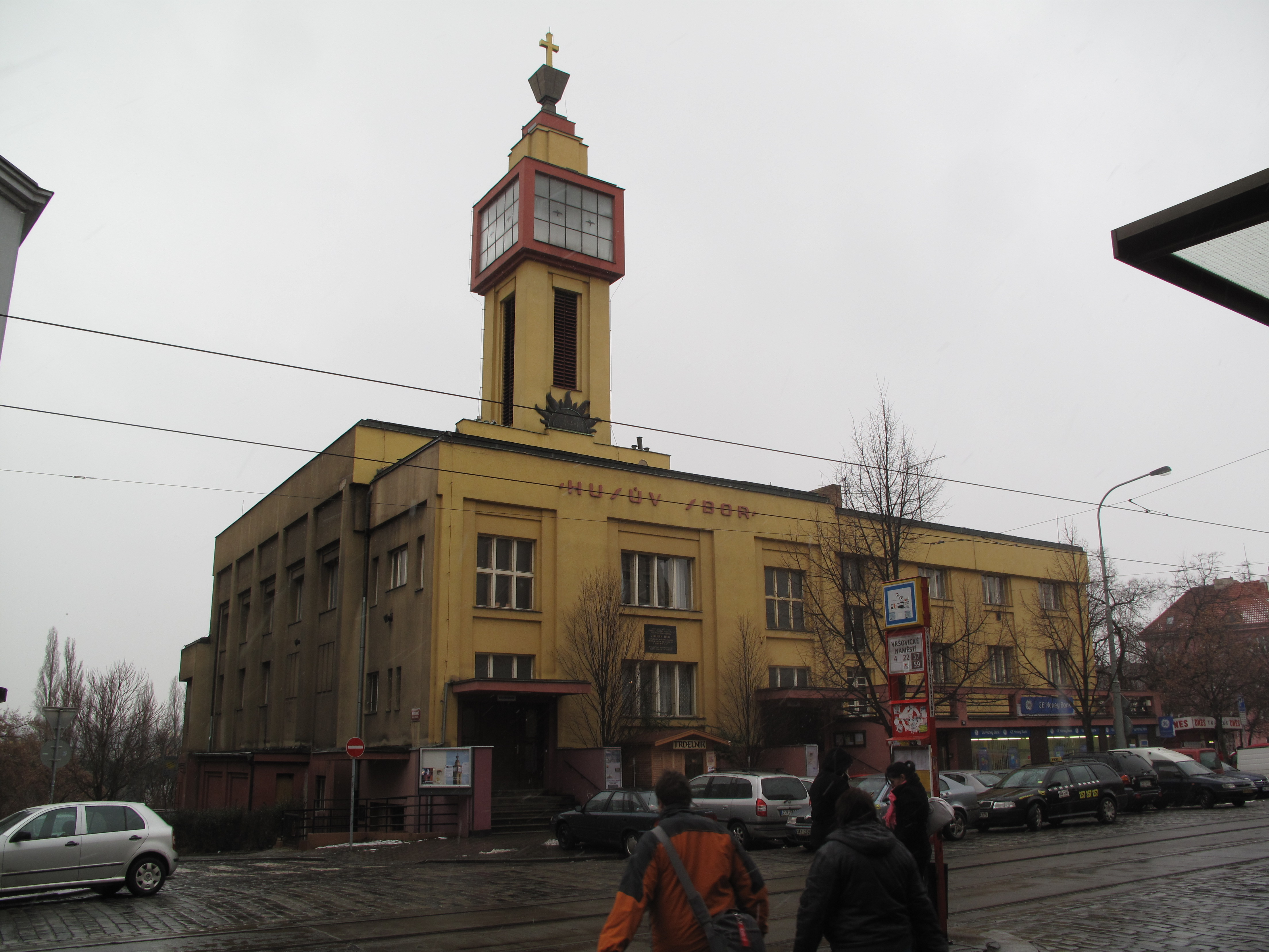 Husův sbor, Vršovice